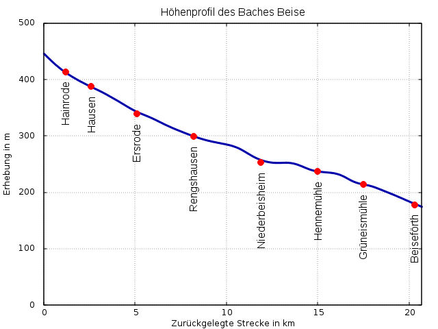 Höhenprofil des Baches Beise